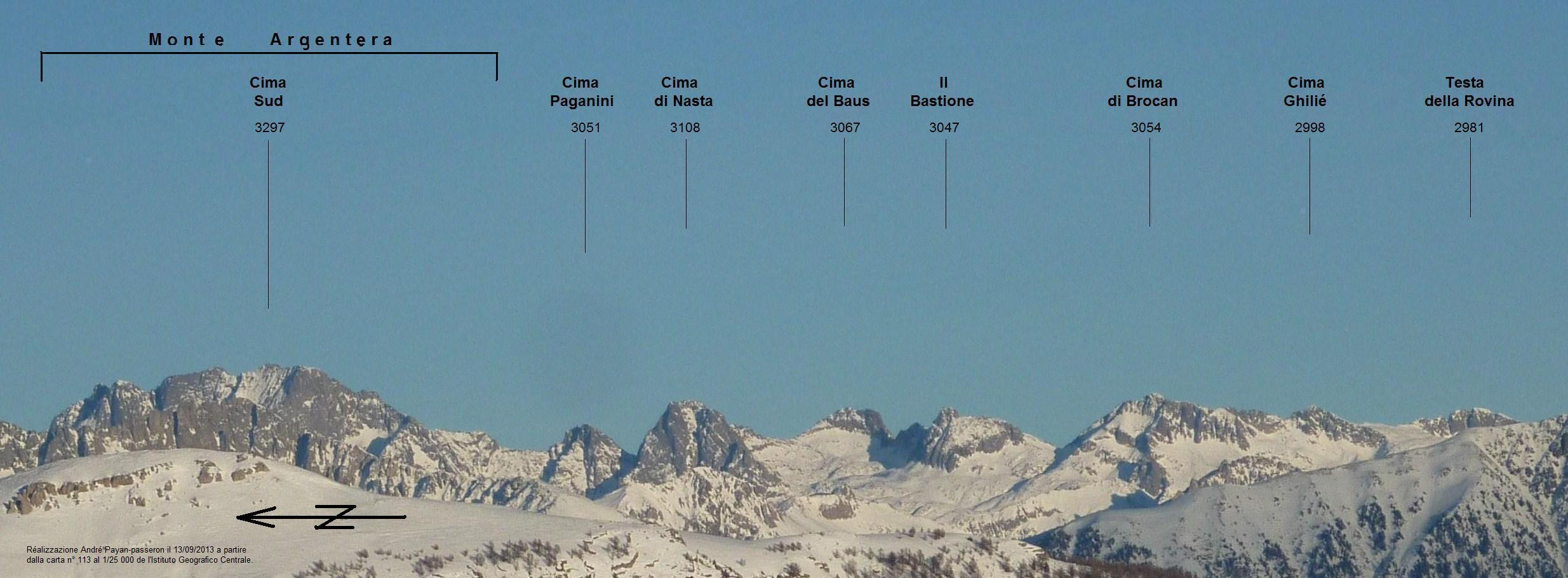 Anello principale del massicio dell' Argentera. Foto preso dell' O.S.O verso el E.N.E. della testa di Charnaye (1792 m - 3° 36 E - 48° 87 N) in 06 - Alpes-Maritimes - FRANCIA.